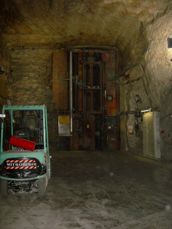 Füllort im Schacht Asse in ca. 490 m Tiefe